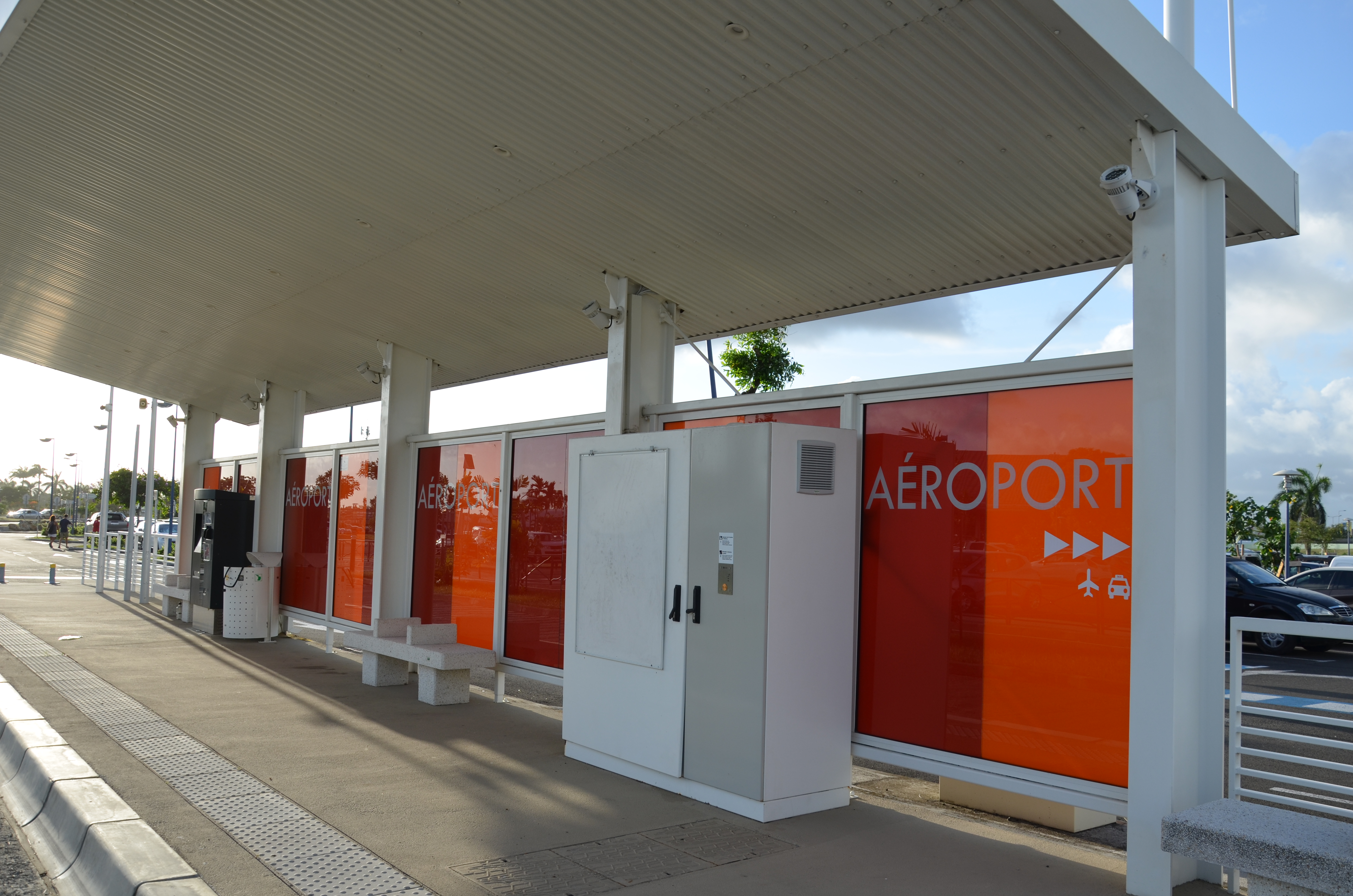 Station "Aéroport" du TCSP au Lamentin, en Martinique.